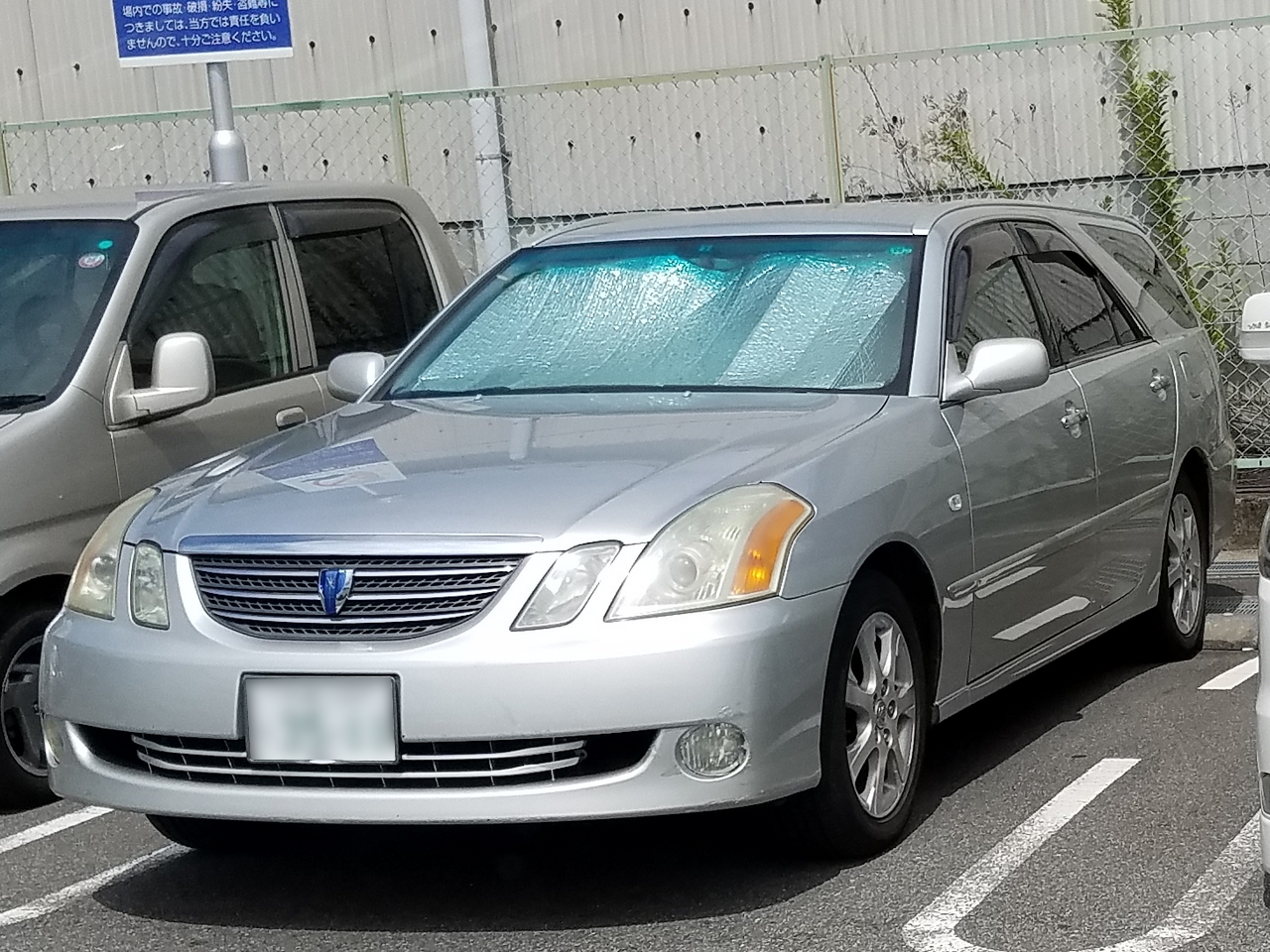 マークIIブリット 2.0iR(前期型)